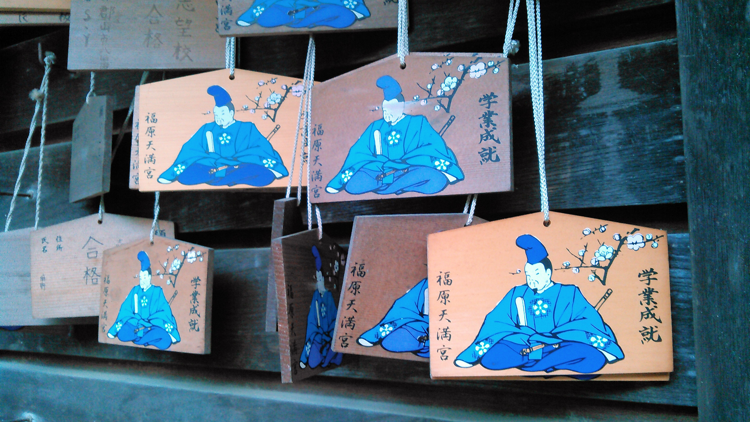 郡山市富久山の豊景神社の境内社 福原天満宮の絵馬